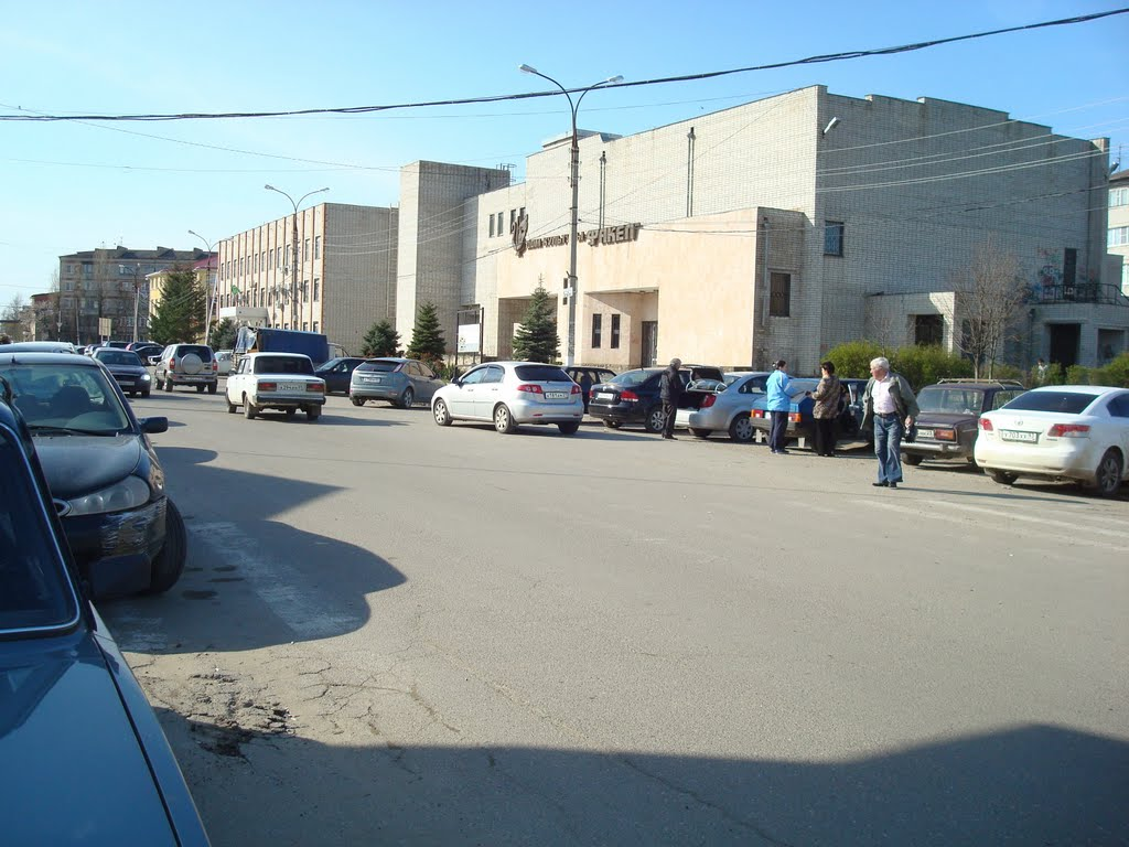 Администрация, пос. Яблоновский, Респбулика Адыгея.